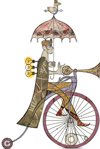 Alergorik Gri Albümü'nden